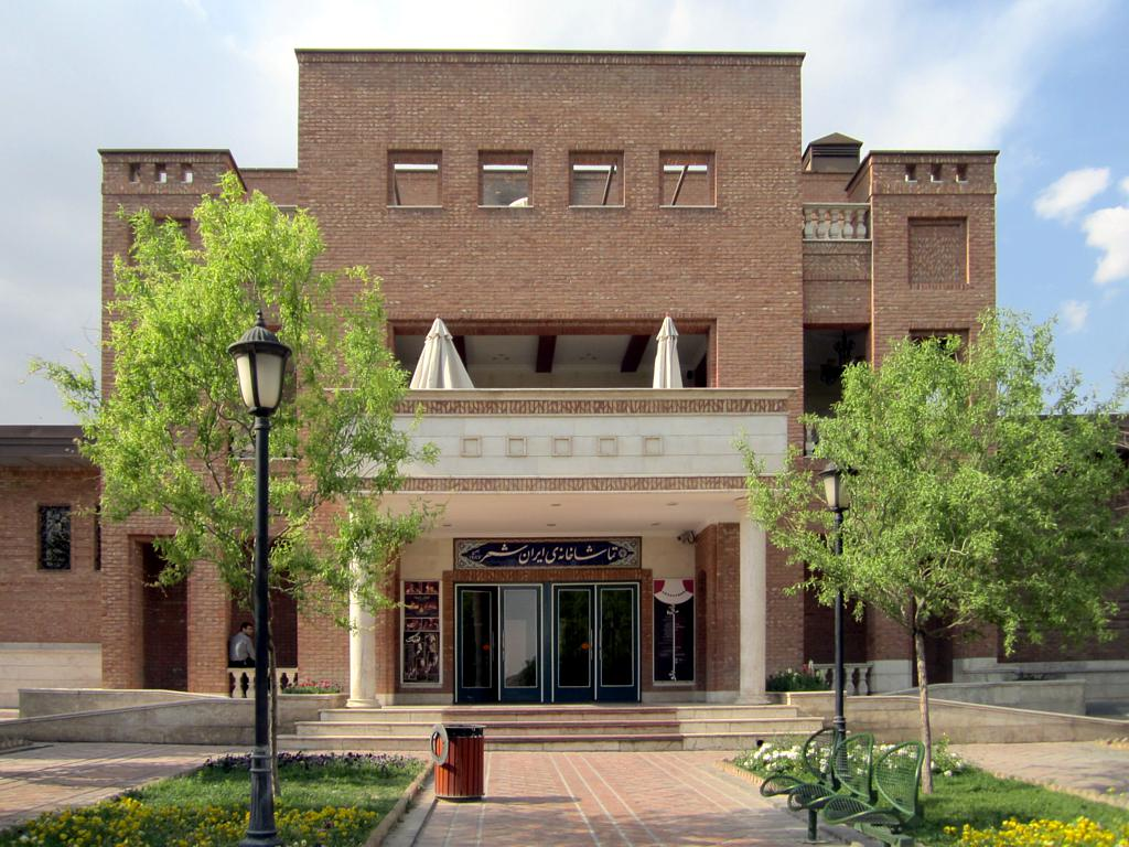 نمایشخانه ایرانشهر در باغ هنر تهران - ایران